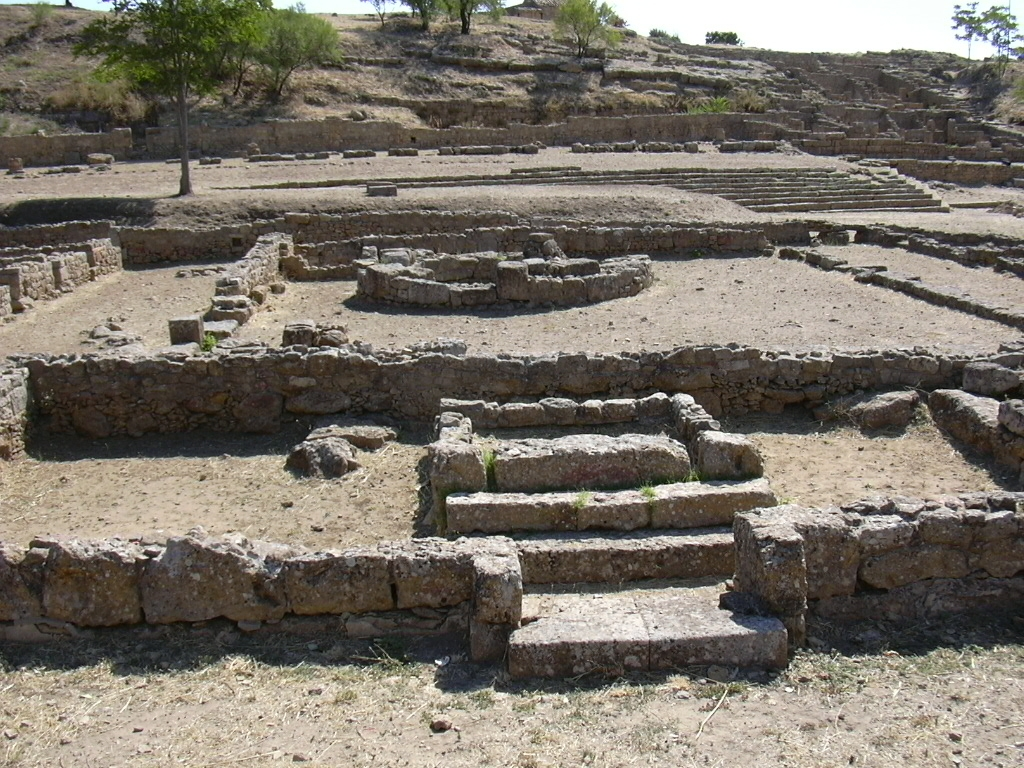 Morgantina: il Macellum, particolare dell'area sacra preesistente inglobata nell'edificio. Il Macellum, un mercato coperto, fu costruito al centro dell'agorà ellenistica, su un'area sacra, in fuori asse rispetto agli altri edifici; è l'edificio più notevole dell'epoca romana(I sec a.C.)